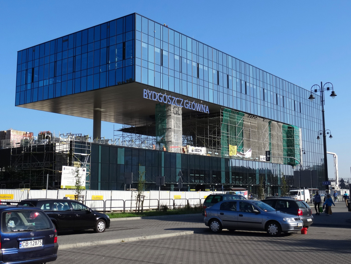 Dworzec kolejowy Bydgoszcz Główna